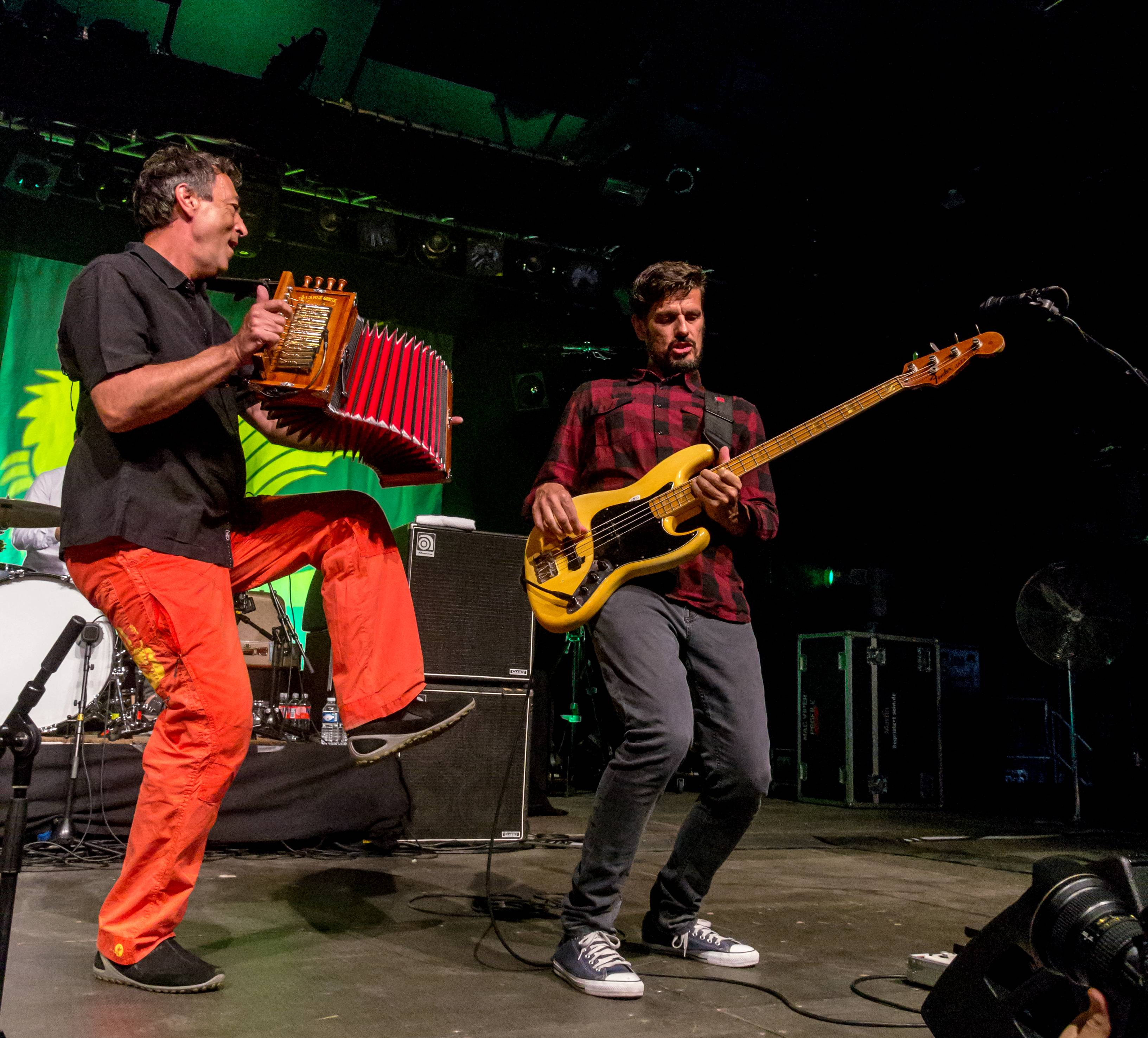 Bilder vom ZMF 2015 Hubert von Goisern